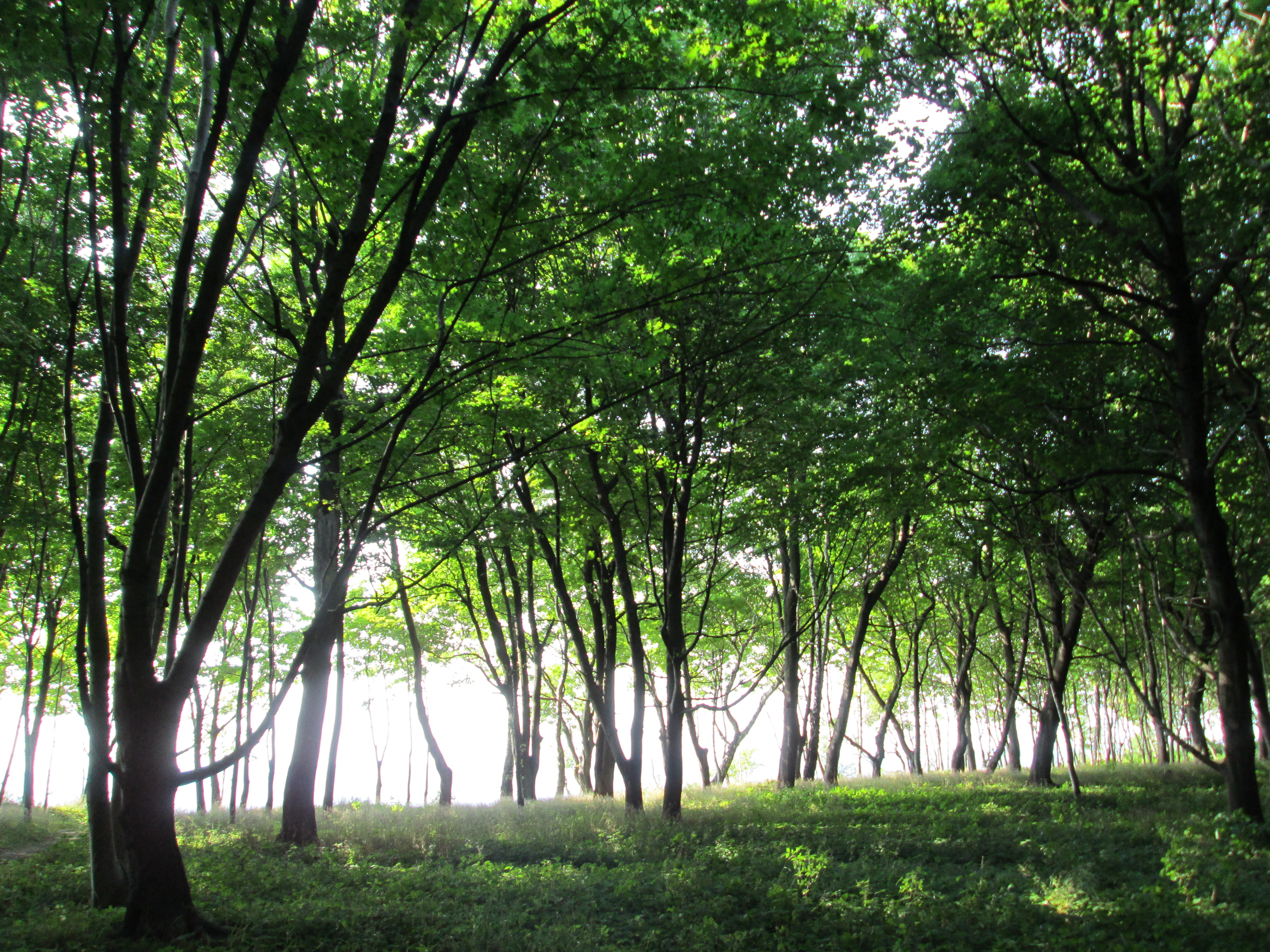 Парк "Янтарный", Светлогорский район This image is related to the protected area of Russia number 3910097